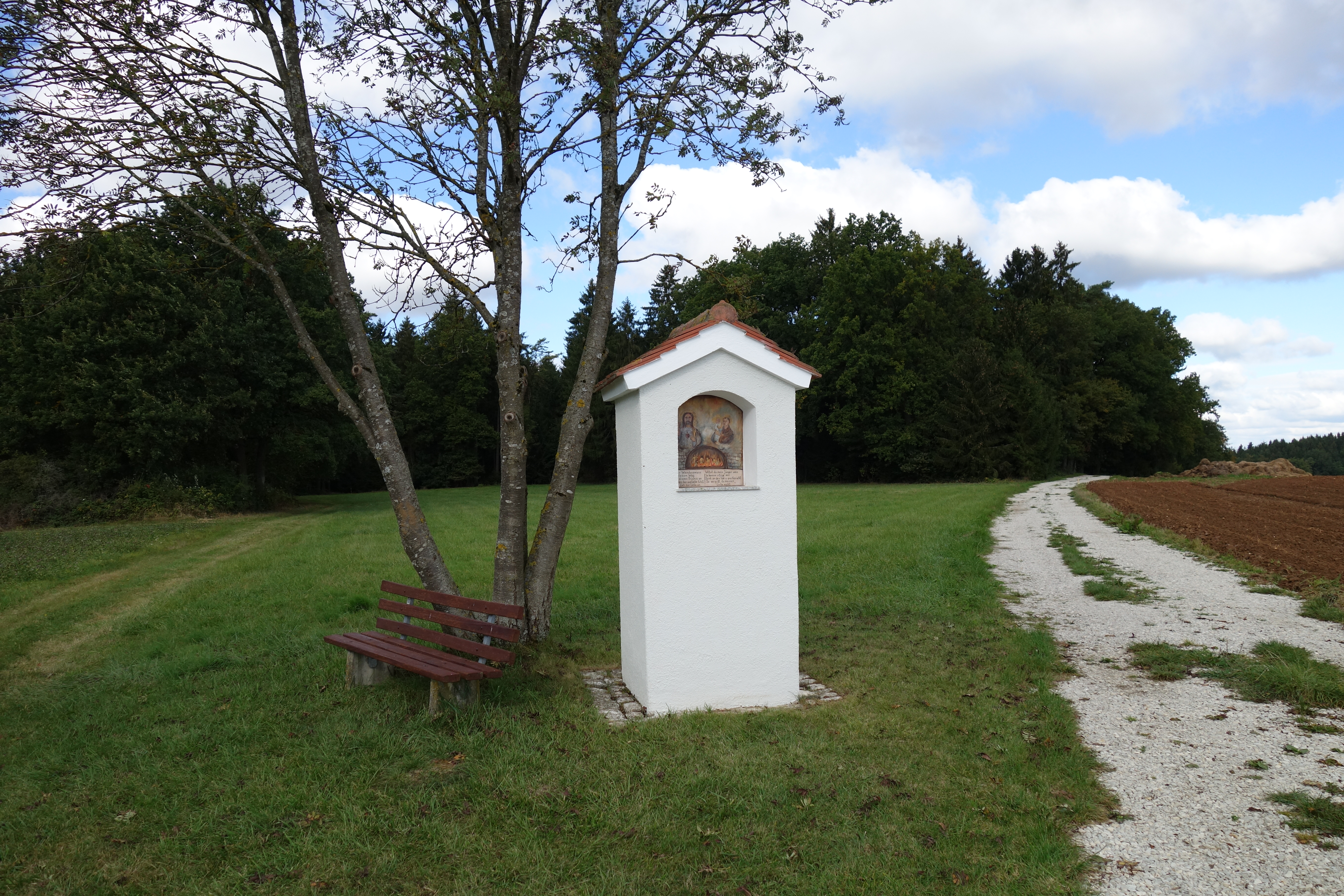 Marter bei Mallerstetten mit Votivbild